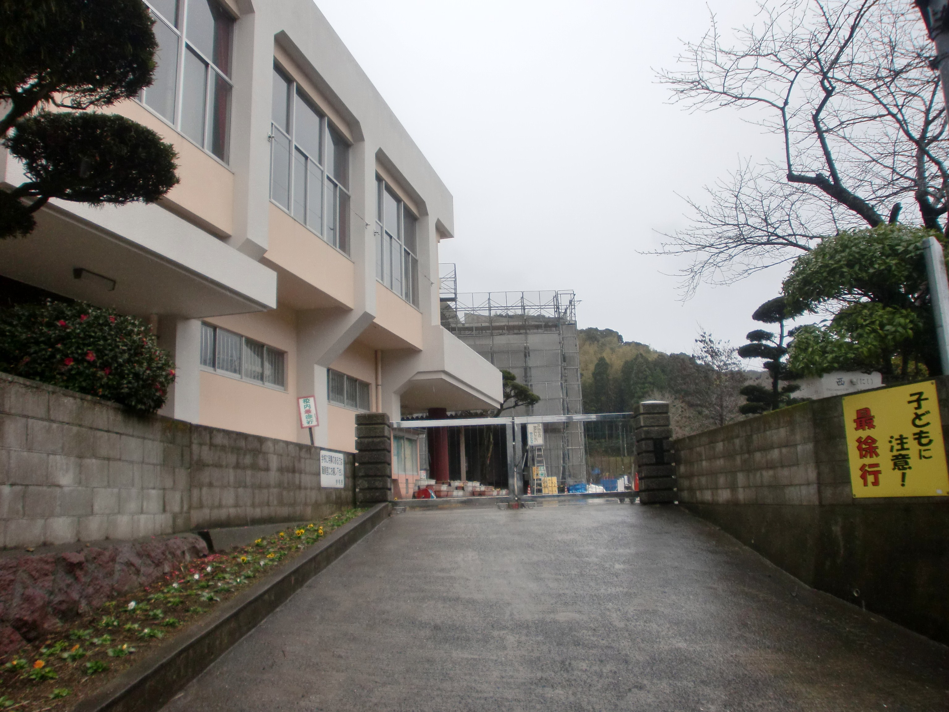 鹿児島市立南方小学校の外観。